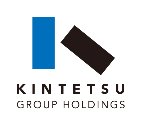 近鉄グループホールディングス株式会社の社章